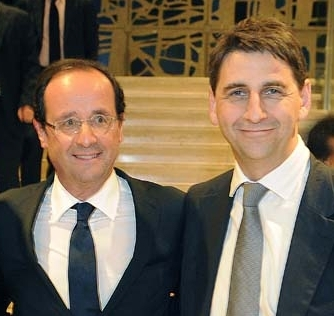 Le candidat à la présidentielle François Hollande et le député de Seine-Saint-Denis Daniel Goldberg à Bondy le 26 mars 2012